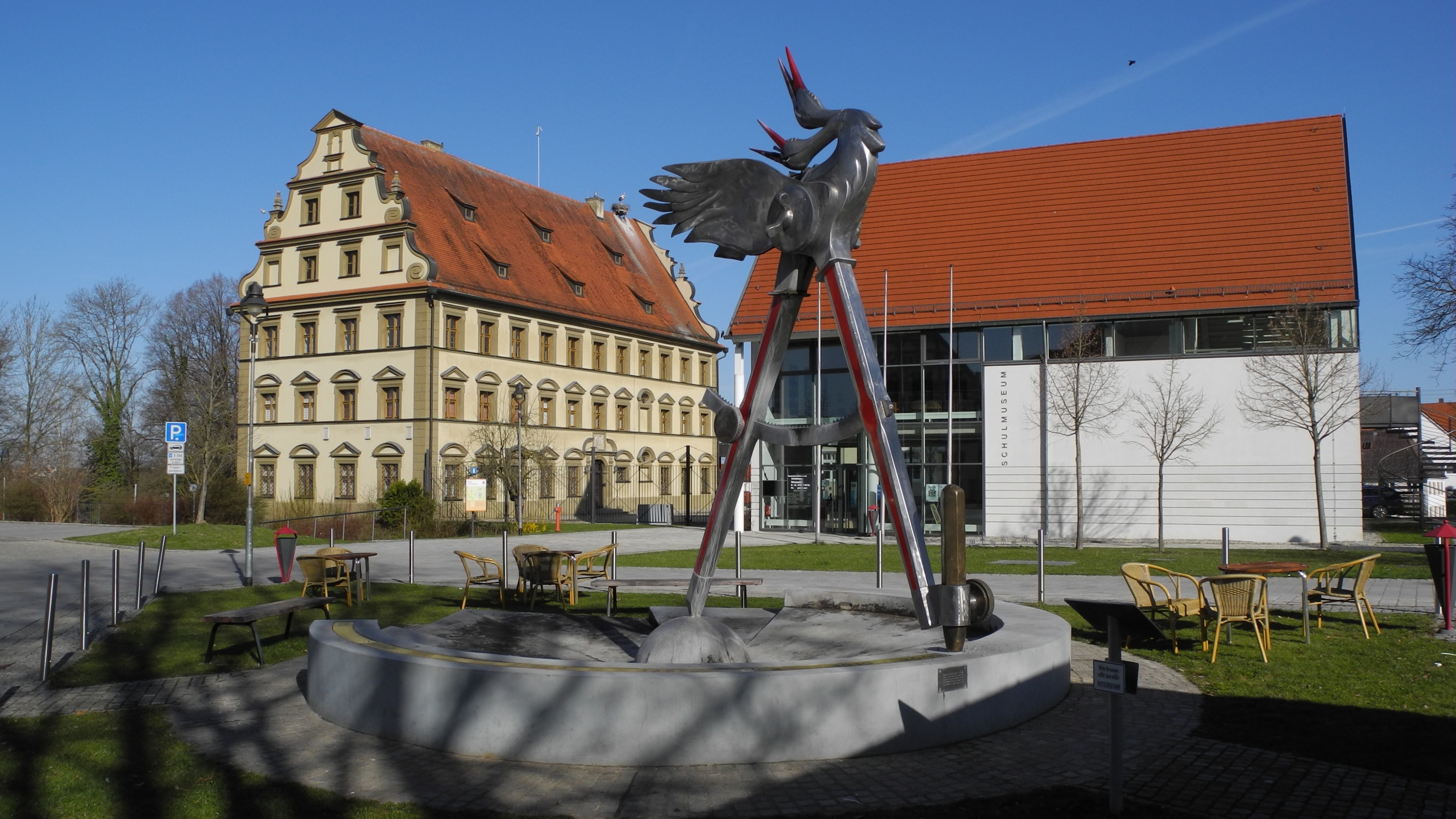 Ichenhausen-Schlossplatz und Bayerisches Schulmuseum